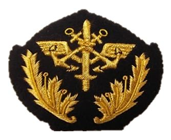 Cet insigne assemble le symbole interarmées (épée, ancre et ailes) et le symbole du commissariat (acanthe)